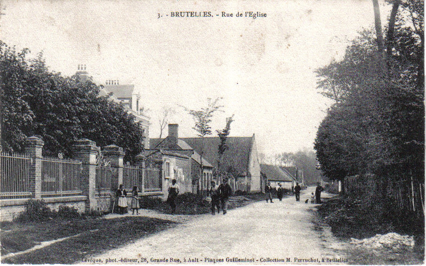 "Rue de l'Eglise"